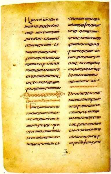 Երկաթագիր ձեռագիր 1171 թվական